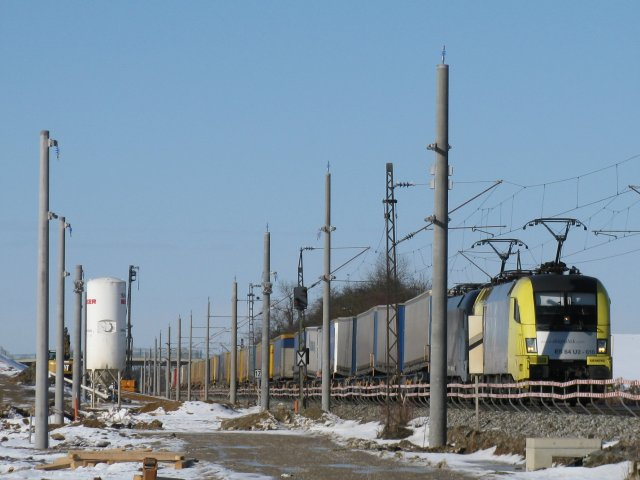 Ausbau der Kursbuchstrecke 980 zwischen Haspelmoor und Mammendorf.